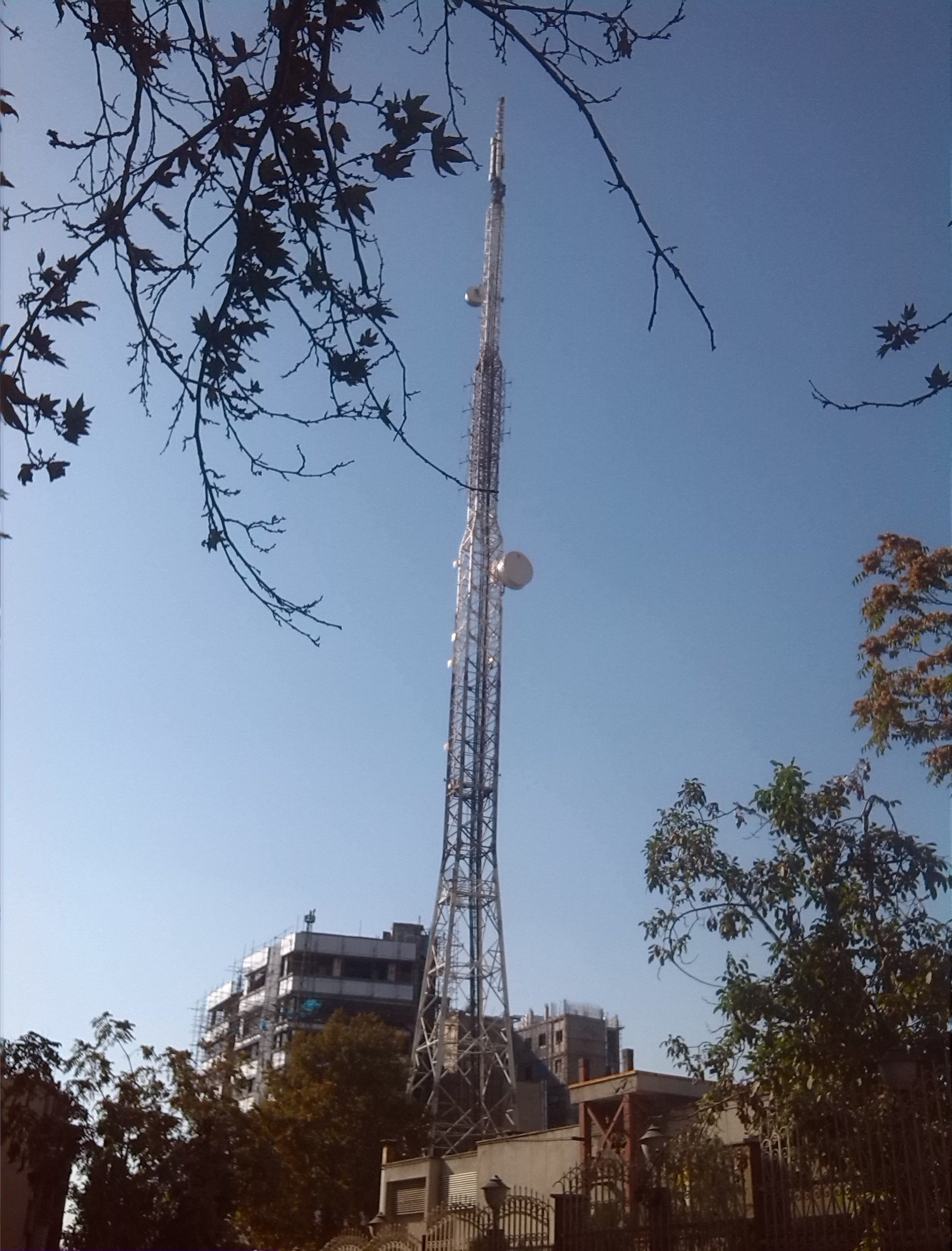 دکل فرستنده دیجیتال الوند تهران (اثر شخصی) و به هیچ عنوان نمی تواند، اثر فردی دیگر شناخته شود.